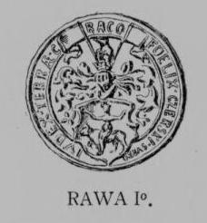 Rawicz Io